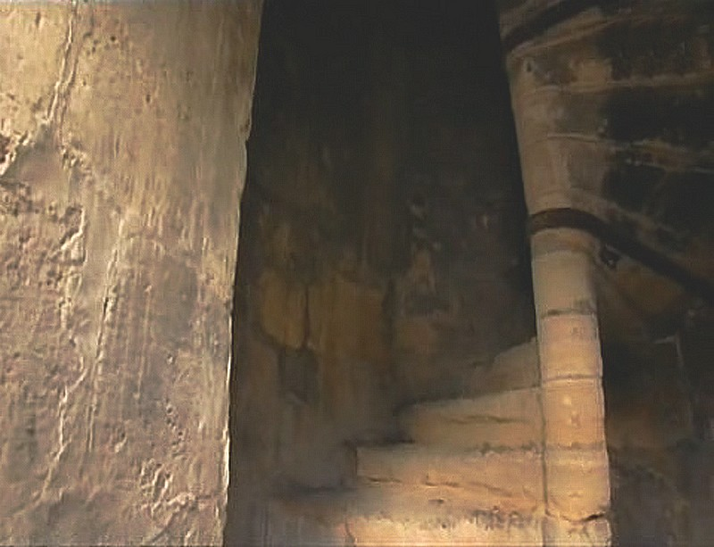 Amorce de l'escalier à l'intérieur de la colonne Médicis. 147 marches permettent l'accès à une plateforme surmontée d'une armature métallique.